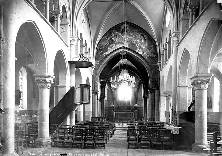 Vue intérieure de la nef vers le choeur